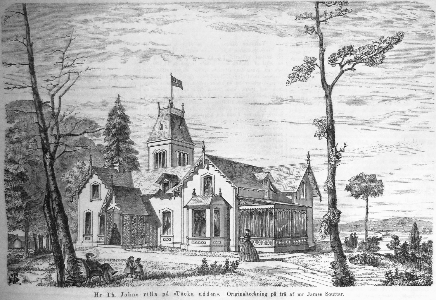 Hr Th. Johns villa på Täcka udden. Originalteckning på trä af mr James Souttar i Illustrerad Tidning, nr 27 den 7 juli 1866.